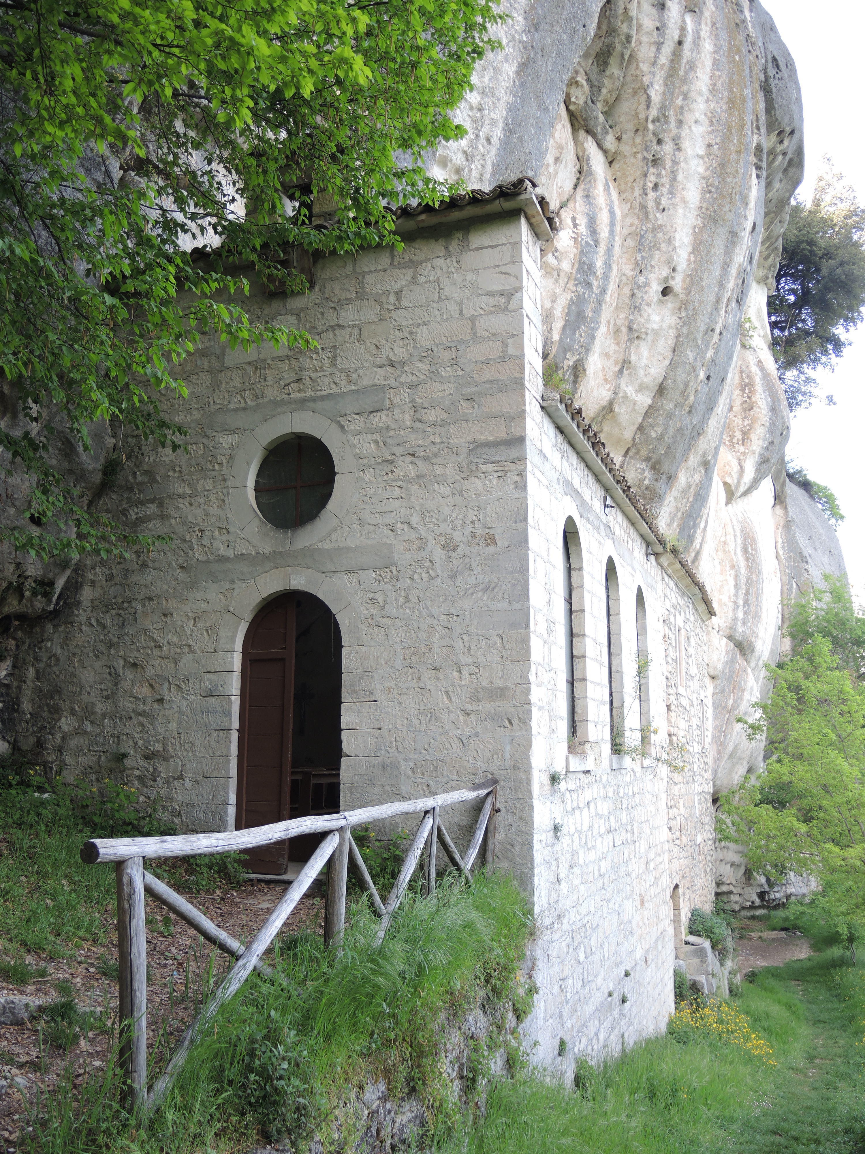 Serramonacesca: Eremo di Sant'Onofrio